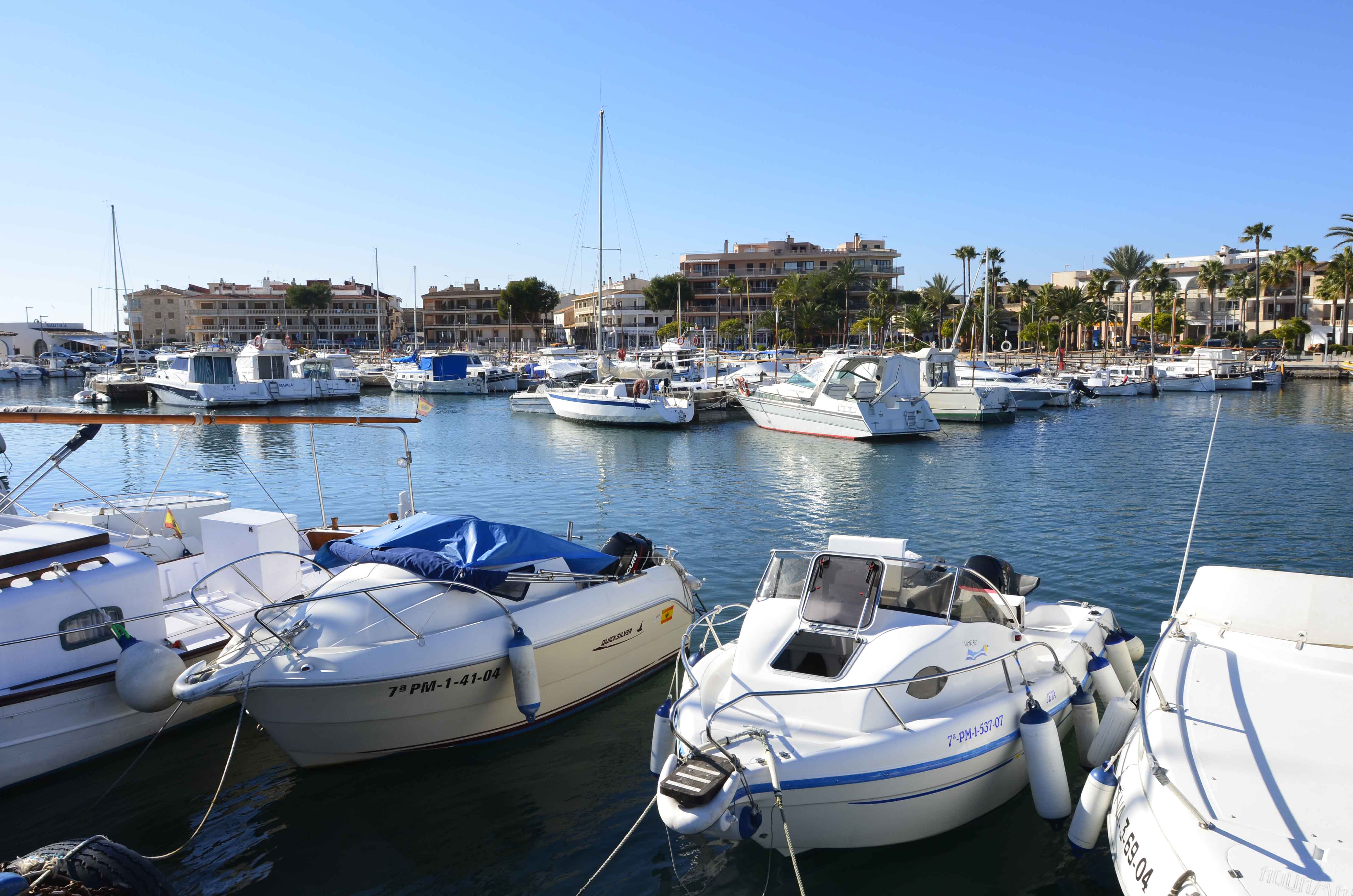 Puerto3